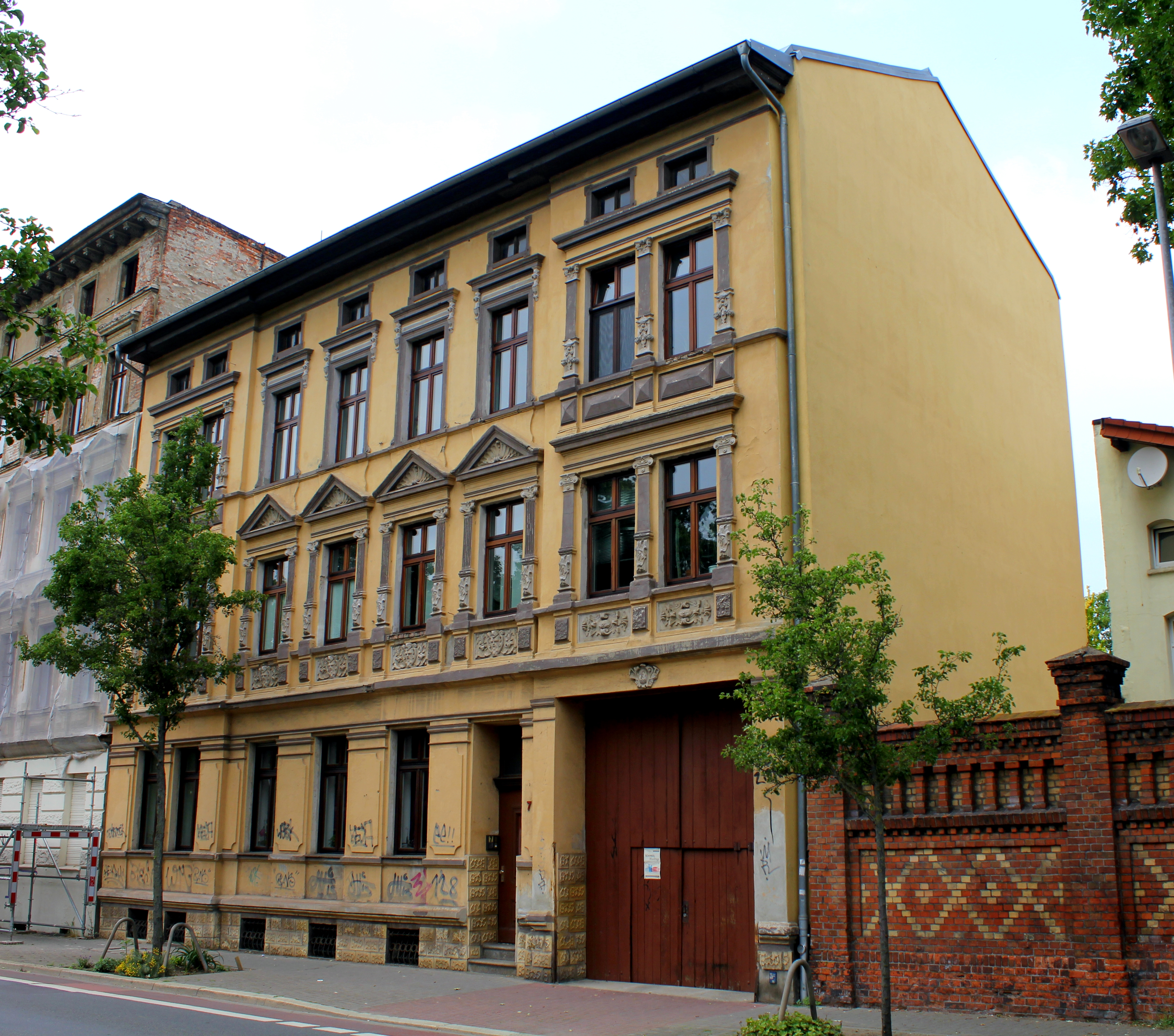 Wohnhaus, Mittagstraße 7, Magdeburg